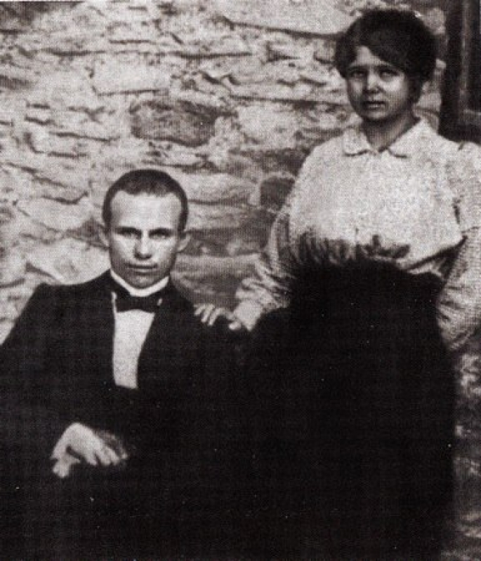 Юзовка. Никита Сергеевич Хрущёв с первой женой — Ефросиньей Ивановной Писаревой